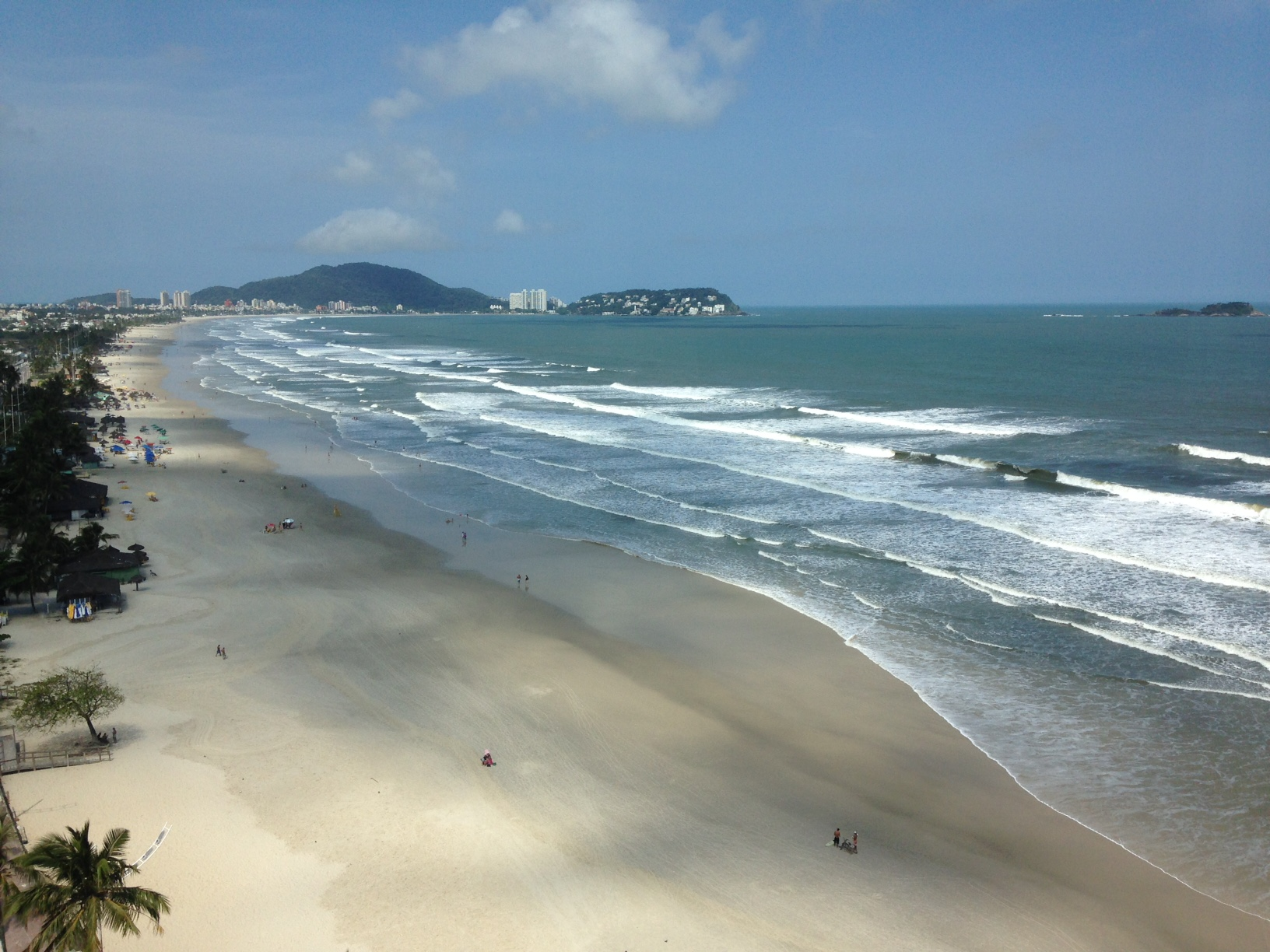 Praia da Enseada, Guarujá